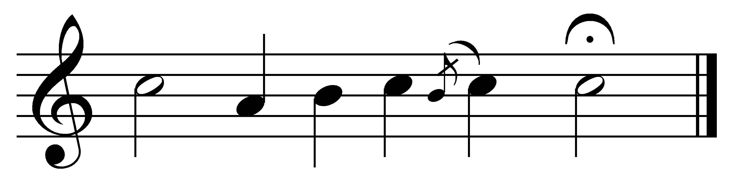 نمونه فرود در آواز ماهور